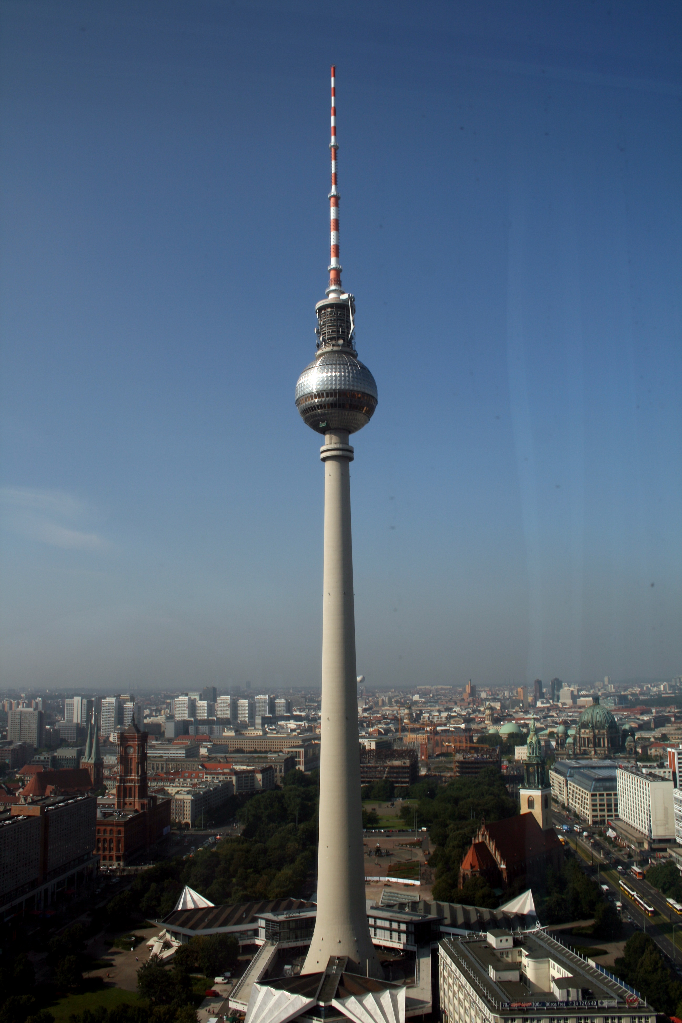 Berlínská televizní věž